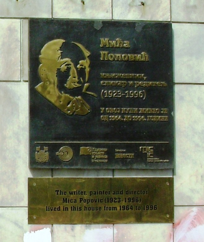 Mića Popović, tabla na zgradu gde je stanovao, Studentski trg, Beograd. Slikao Goldfinger